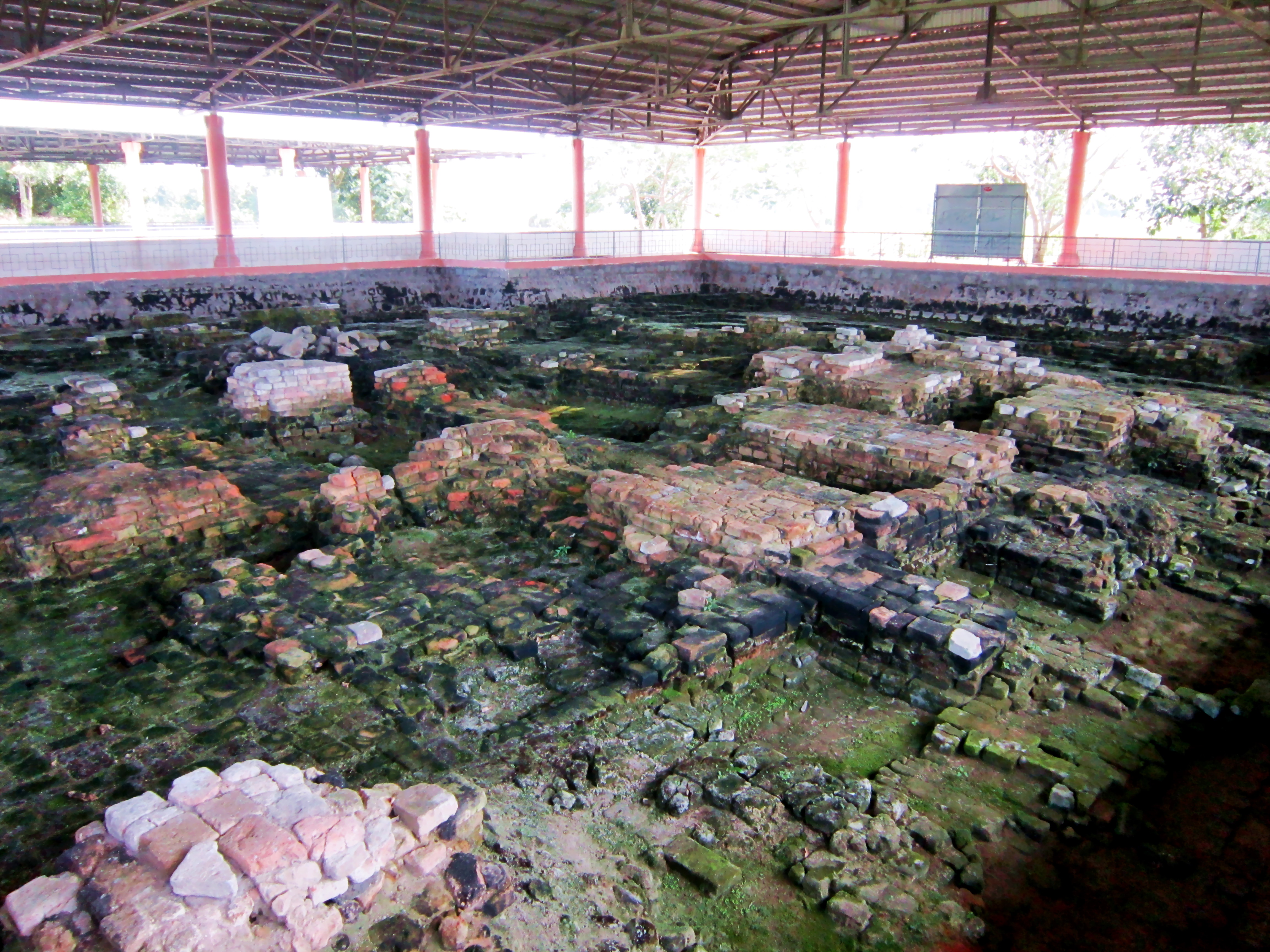 Di tích Gò Cây Thị A (một trong những di chỉ thuộc nền văn hóa Óc Eo) ở thị trấn Óc Eo, huyện Thoại Sơn, An Giang, Việt Nam.